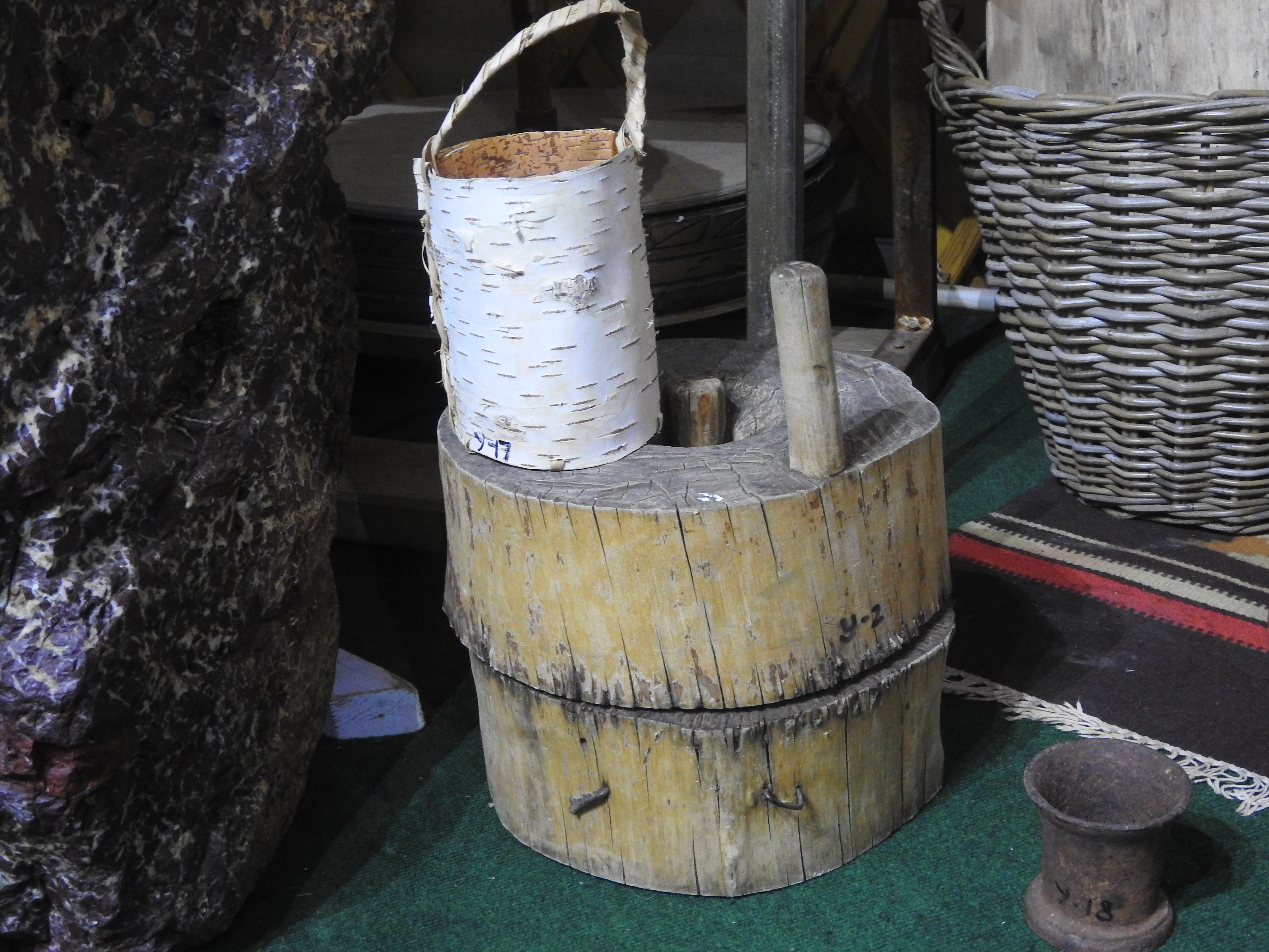 Башҡортса: Ҡул тирмәне, ҡайын туҙынан эшләнгән тырыз